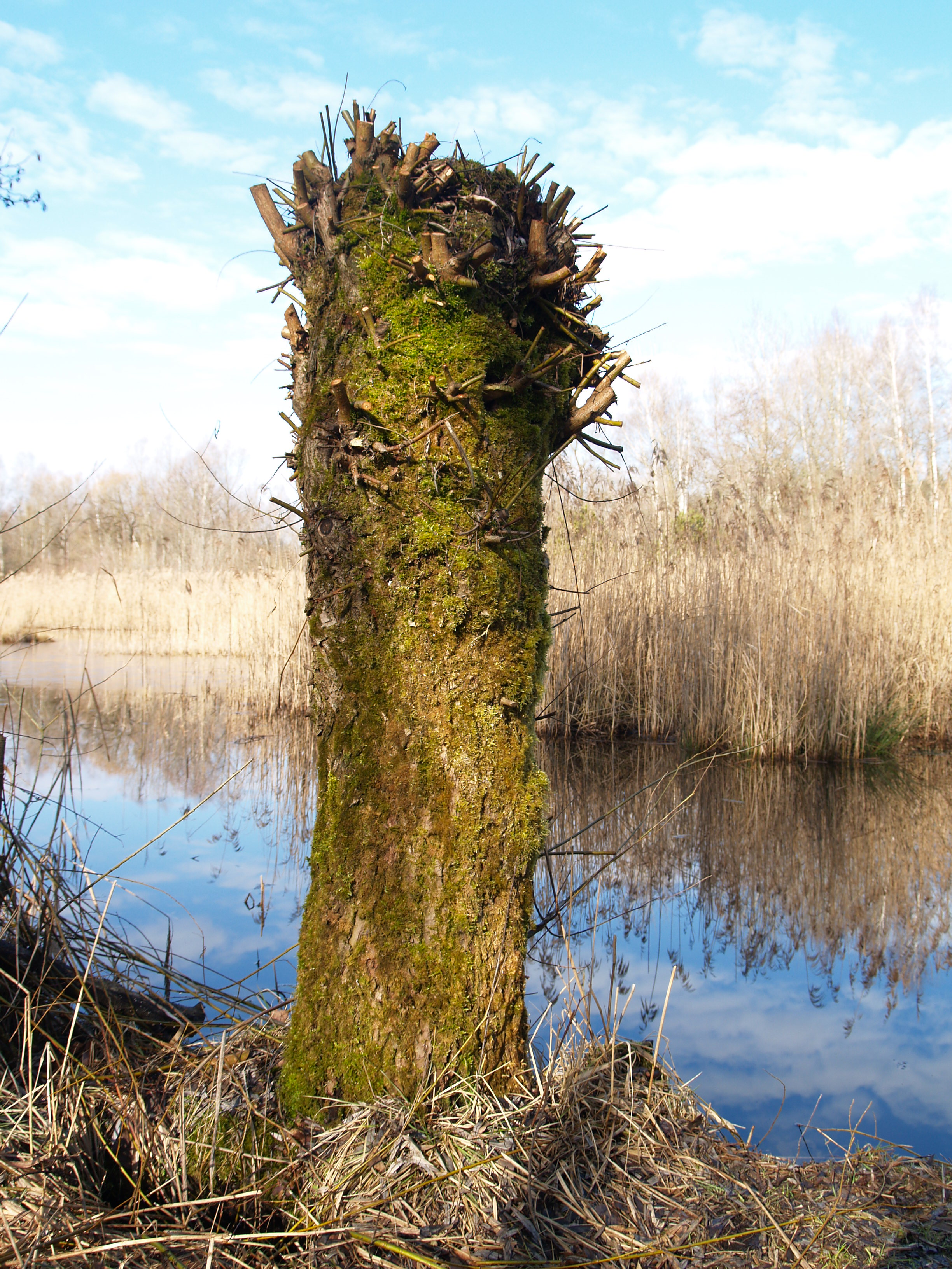 Bürmooser Moor This media shows the nature reserve in Salzburg with the ID NSG00028.